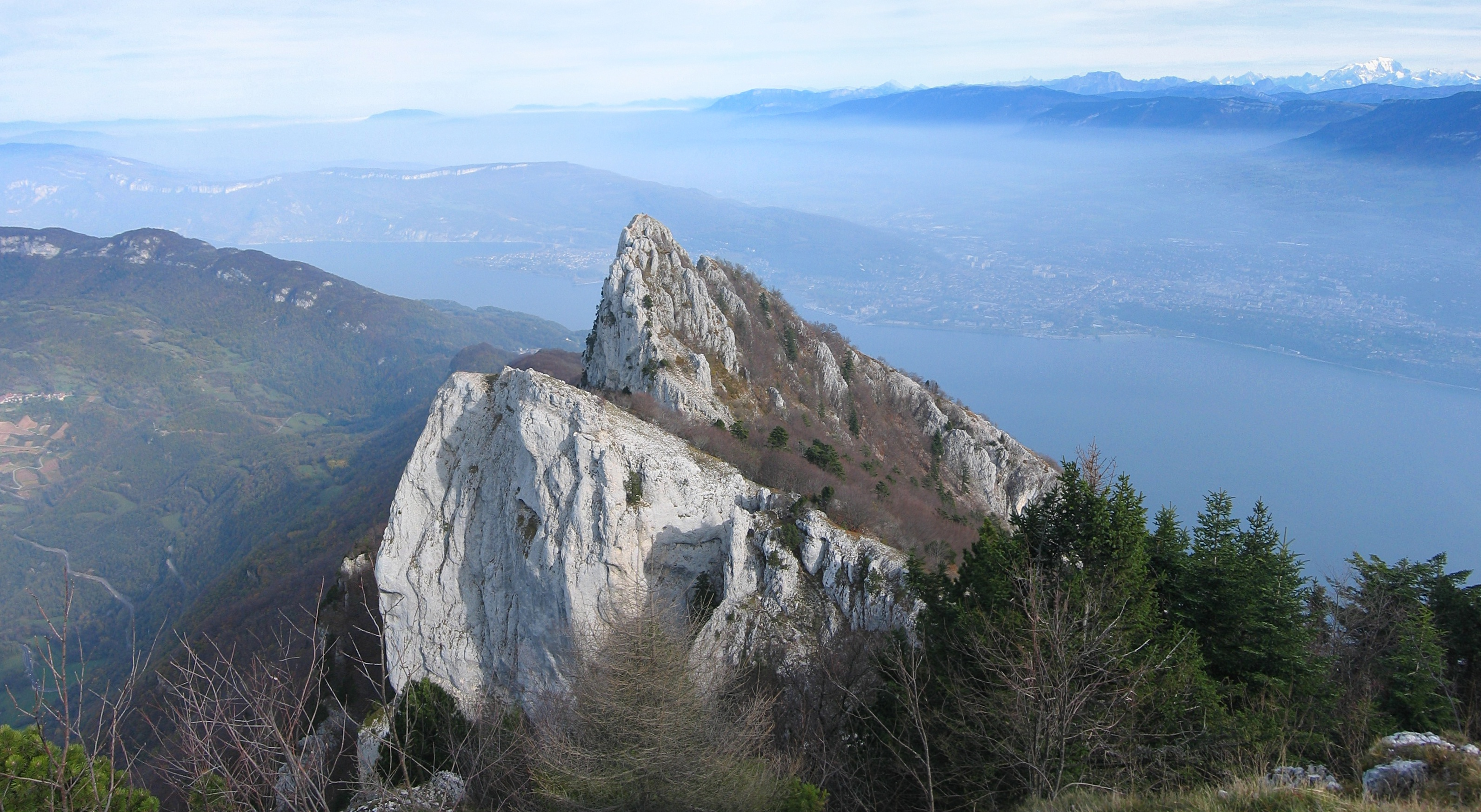 La Dent du Chat (1390m) vue depuis le Mollard Noir. Au fond, le lac du Bourget